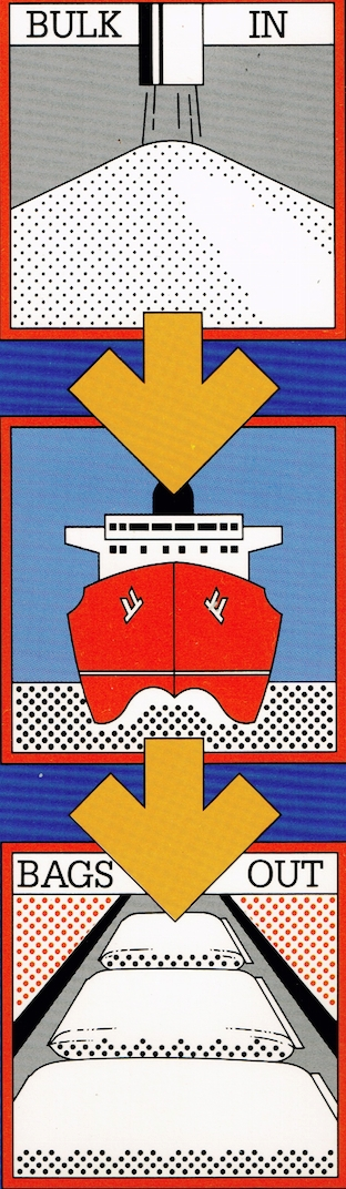 מערכת אונית צובר מתמחה ביבו